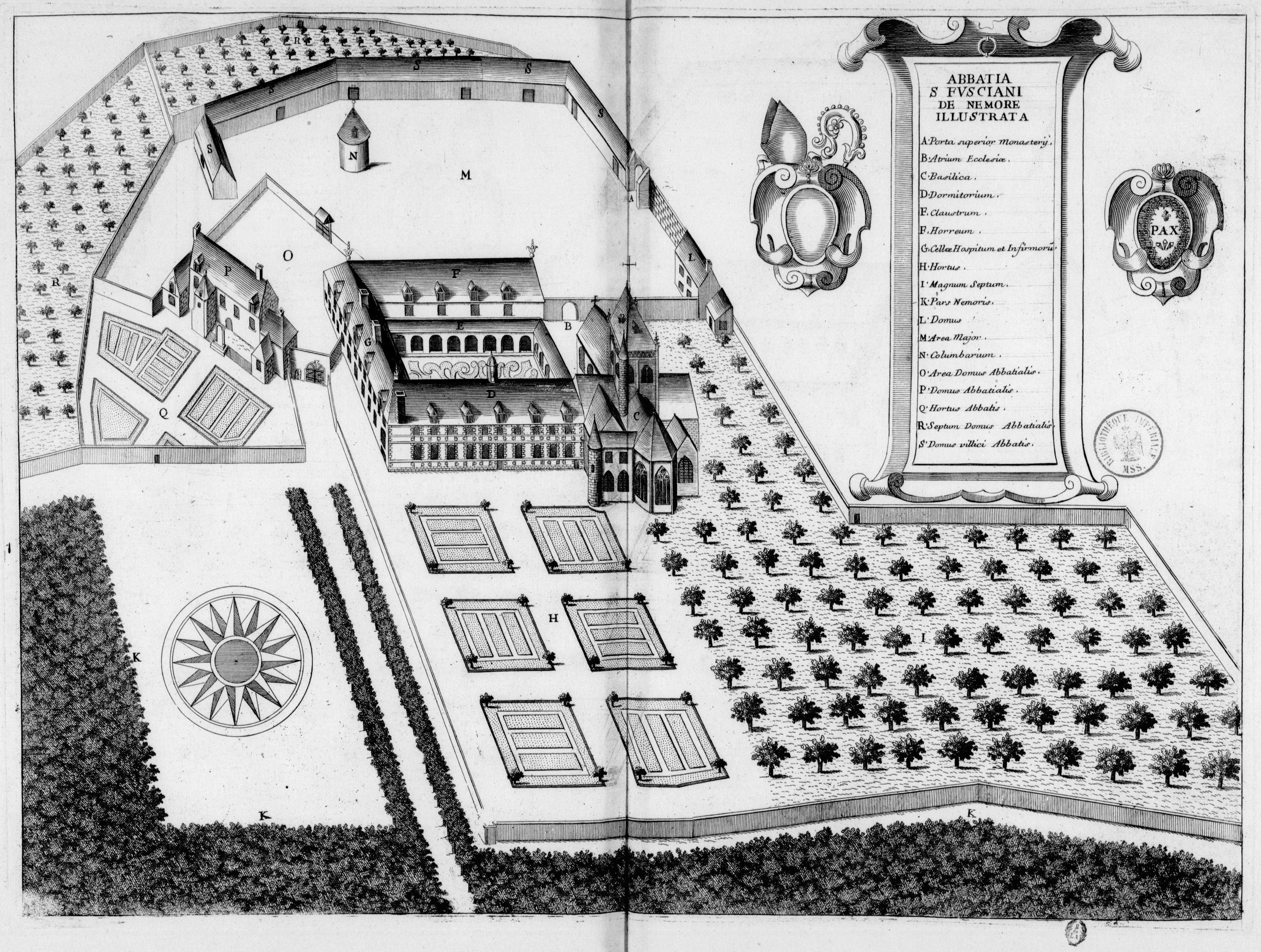 Planche gravée du 17ème siècle représentant l'abbaye de Saint-Fuscien-aux-Bois, dans le livre Monasticon Gallicanum.